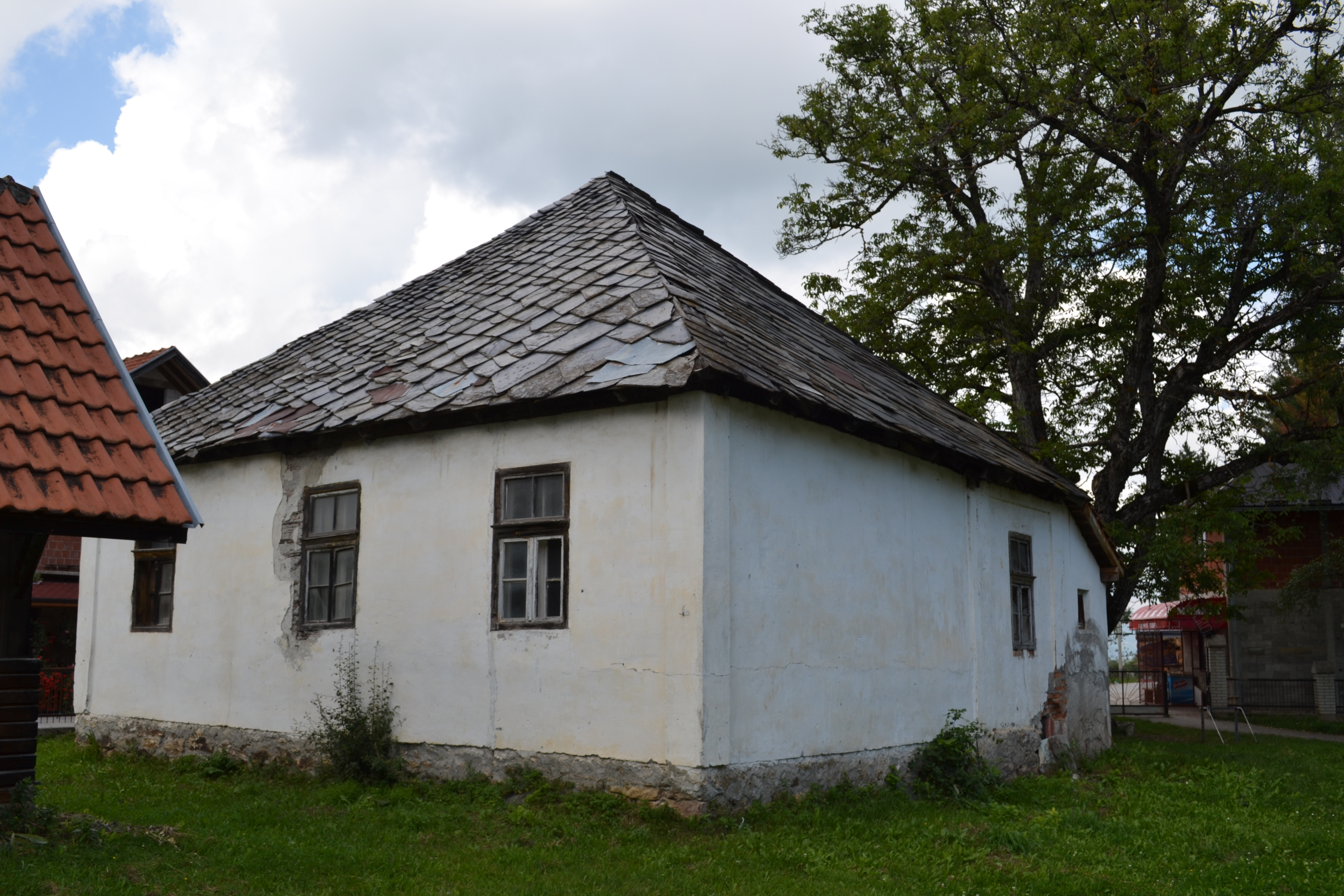 OŠ Milan Vučićević Zverac Bratljevo, prva